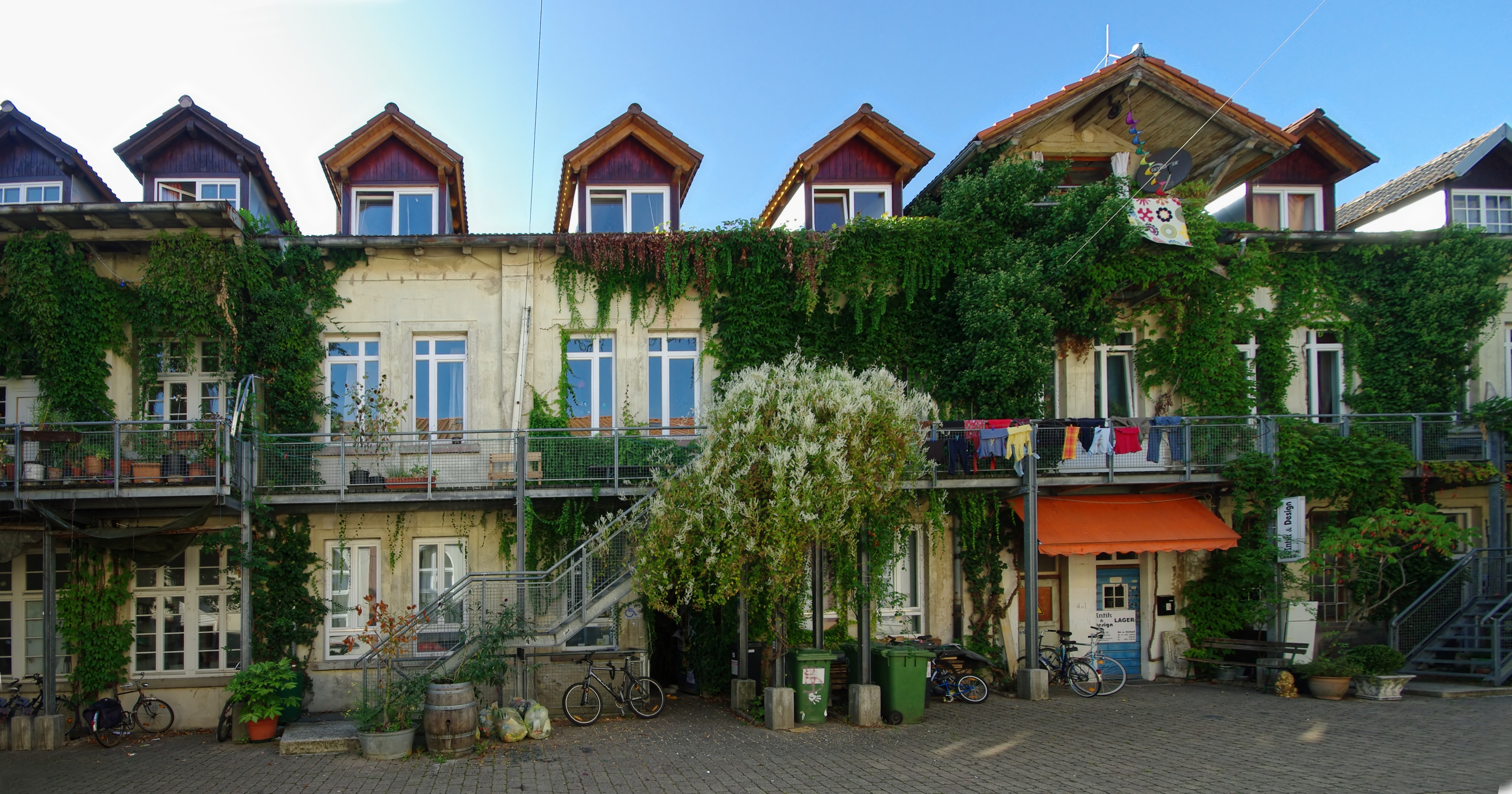 Das Studio des Radio Dreyeckland befindet sich in diesem Gebäude auf dem Grethergelände in der Adlerstraße 12 in Freiburg Der Eingang ist unter der zentralen Treppe